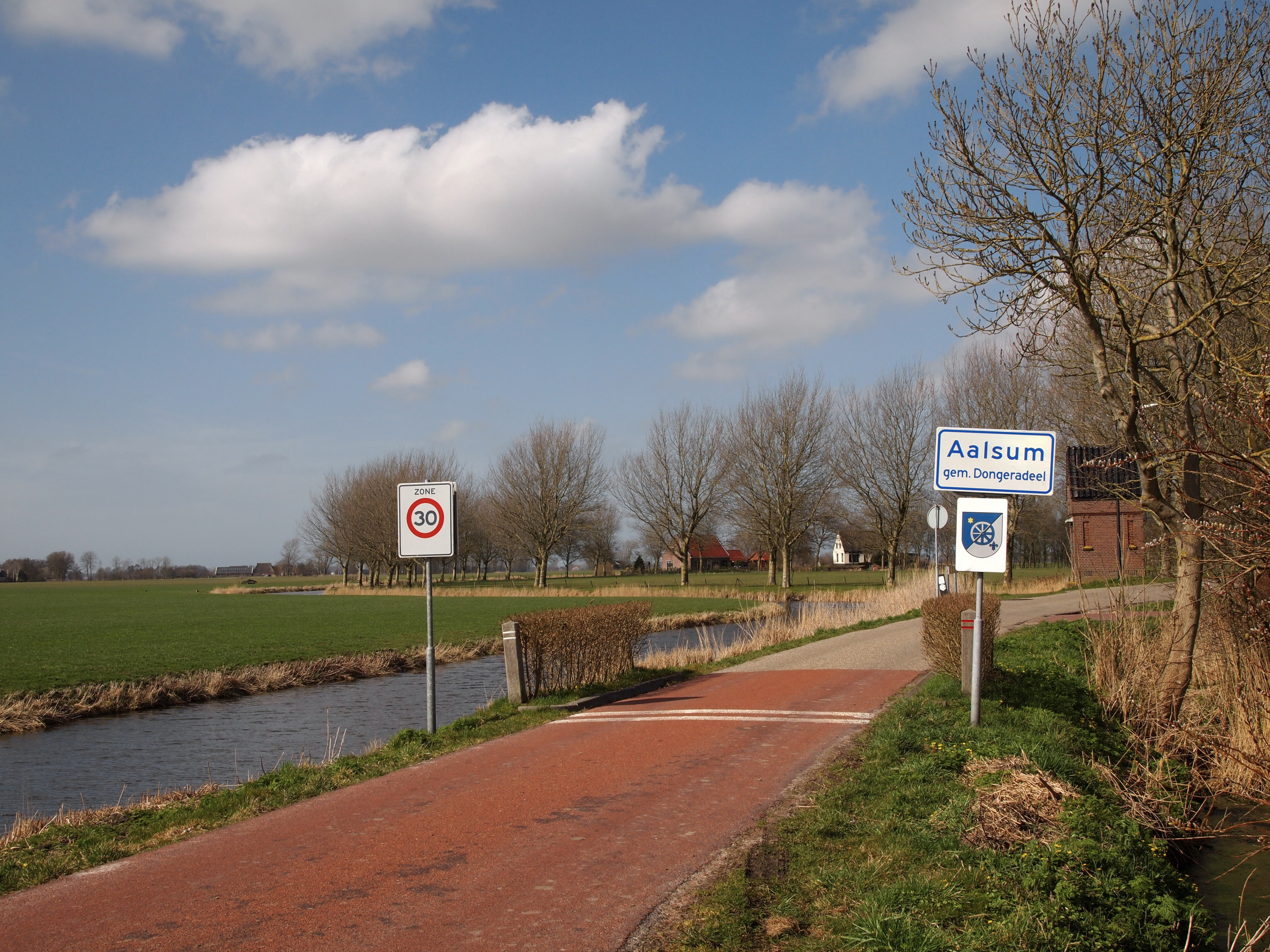 Welkom in Aalsum